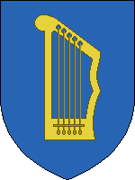 Герб уезда Петсери 1937 года, Эстония (ныне в составе Псковской области)